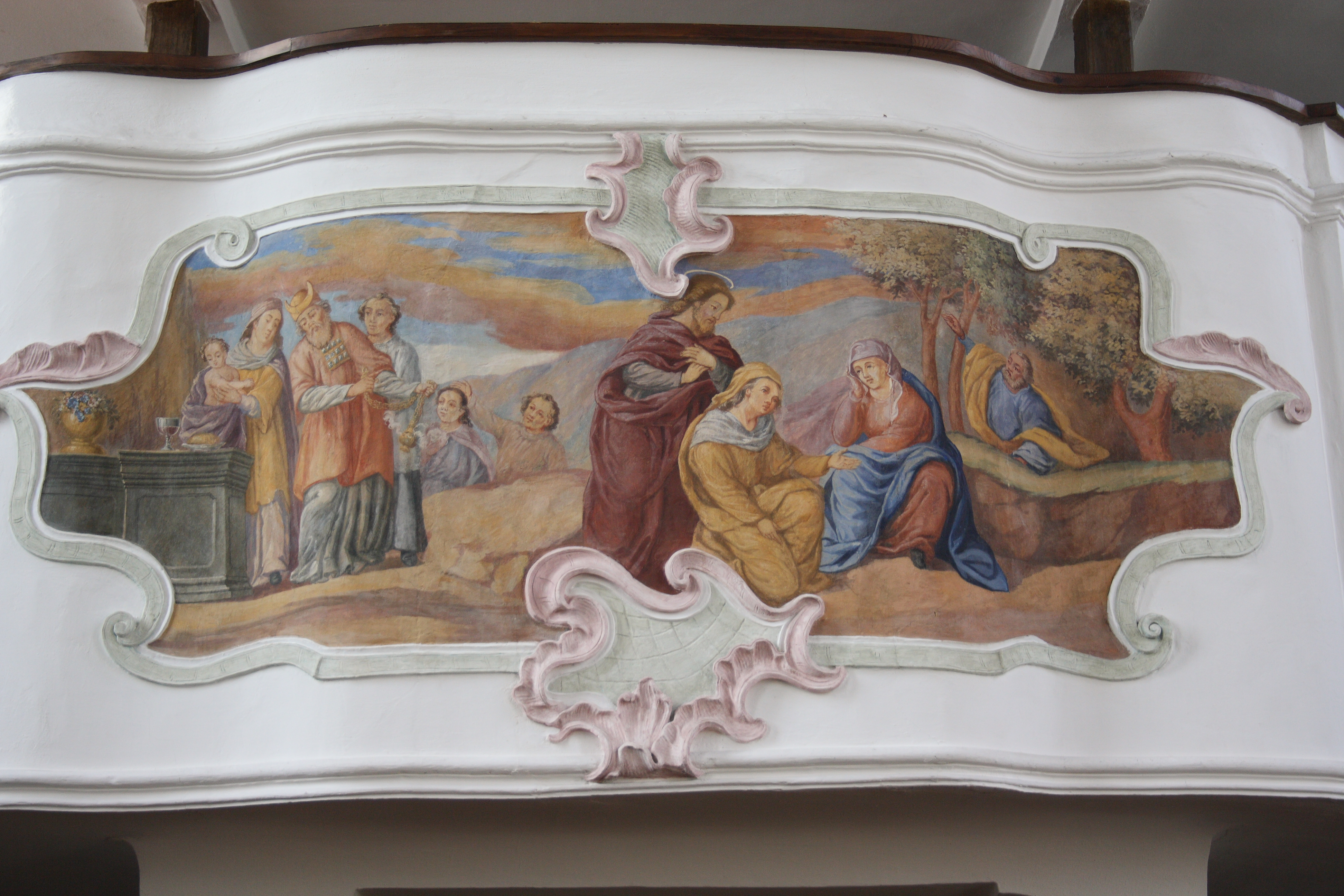 Katholische Pfarr- und Wallfahrtskirche Mariä Schmerzen in Waldkirch, einem Ortsteil von Winterbach (Schwaben) im Landkreis Günzburg (Bayern), Orgelempore; Darstellung: hl. Anna und Joachim